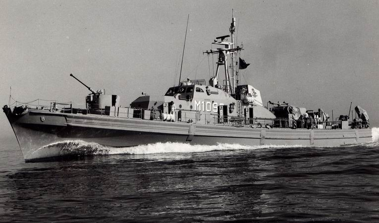 Schnelles Minensuchboot Fische der Bundesmarine, 5. Minensuchgeschwader, Olpenitz.